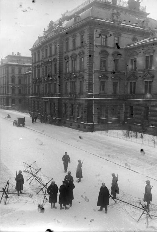 Zu dem Hitler-Ludendorf-Prozess in München. Die Kriegsschule, in welcher der Prozess geführt wird, mit Absperrungen. Information added by Wikimedia users.München (Blutenburgstraße), Hitler-Ludendorff-Prozess in der Infanterieschule der Reichswehr